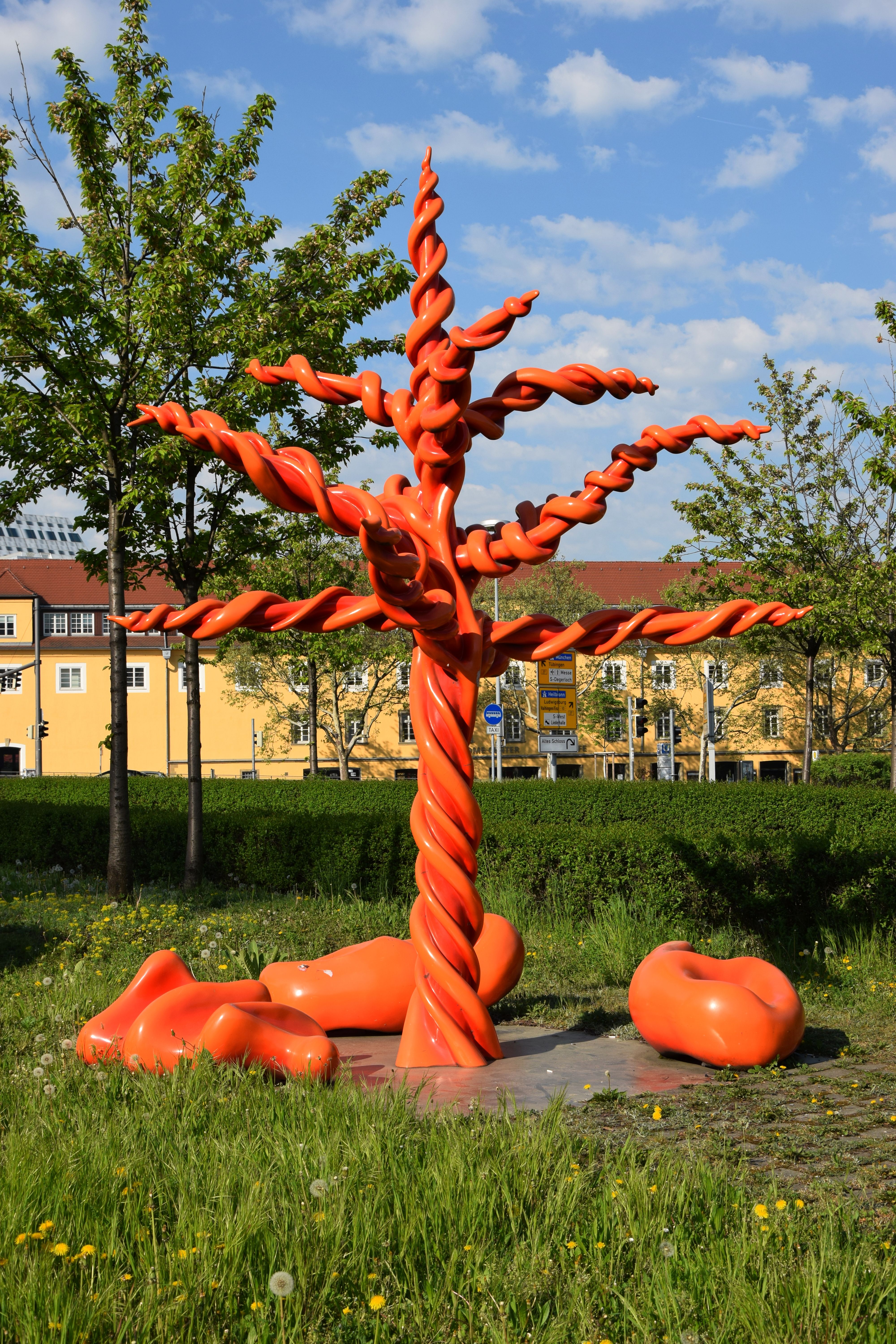 Kunstwerk Roter Baum der Künstlerin Mariella Mosler. Standort Stuttgart-Mitte, Konrad-Adenauer-Straße 2 beim Wilhelmspalais.